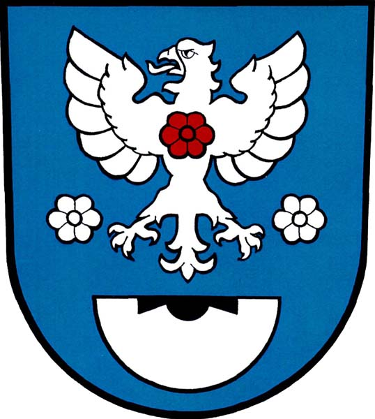 Znak obce Rusín